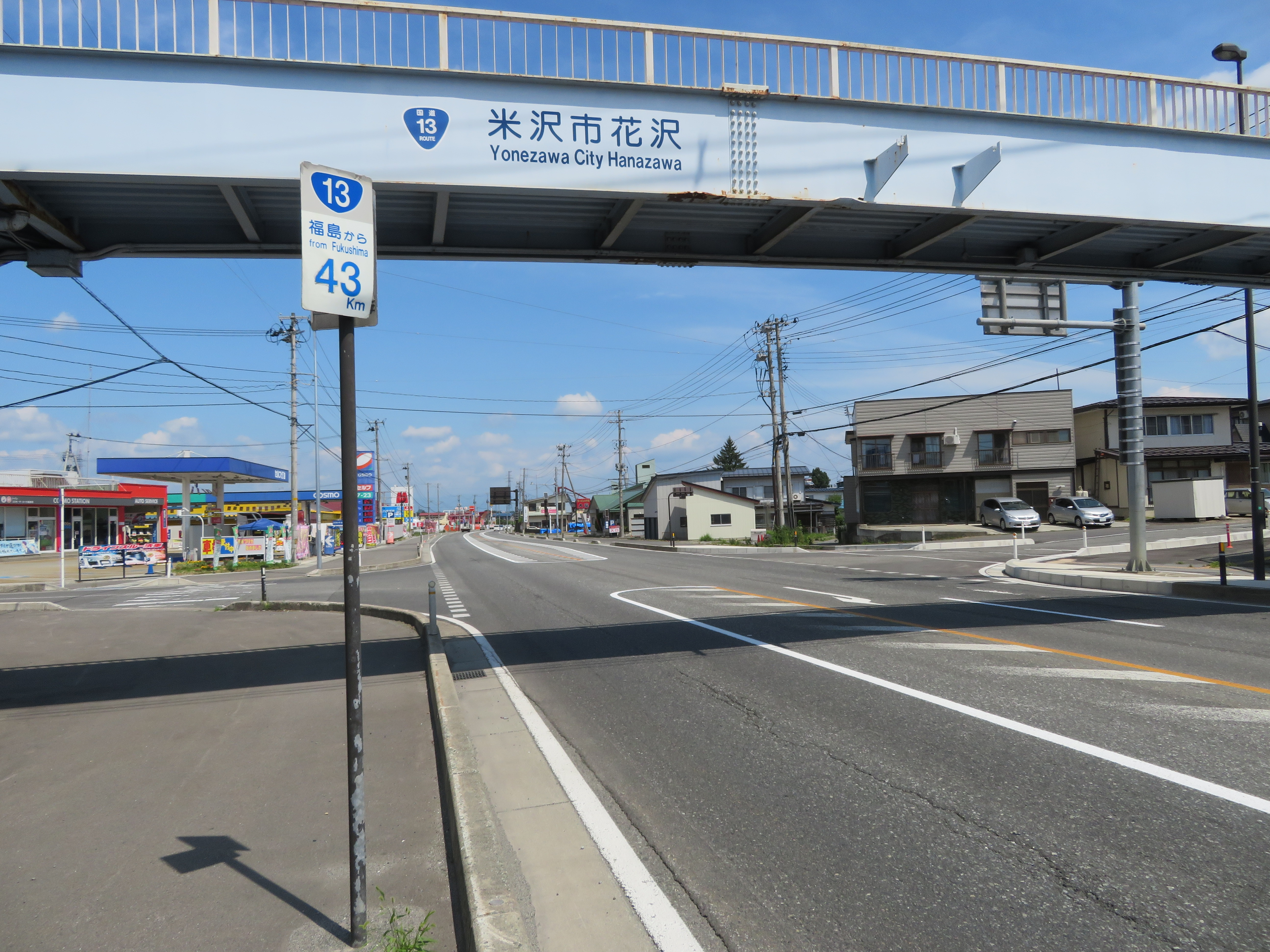 国道13号線 山形県米沢市花沢歩道橋付近（南陽方面を撮影） Canon PowerShot SX720 HS